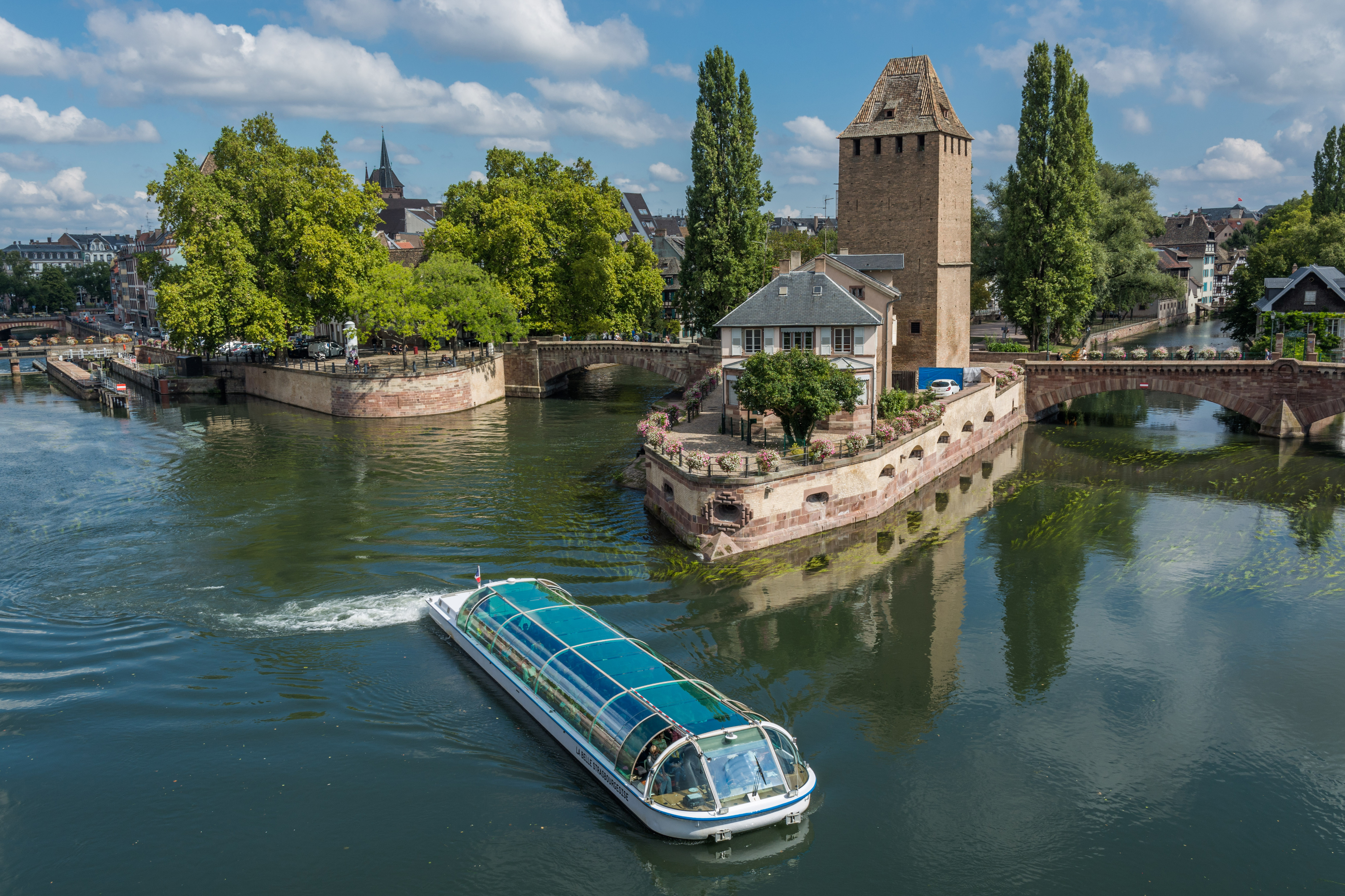 Straßburg